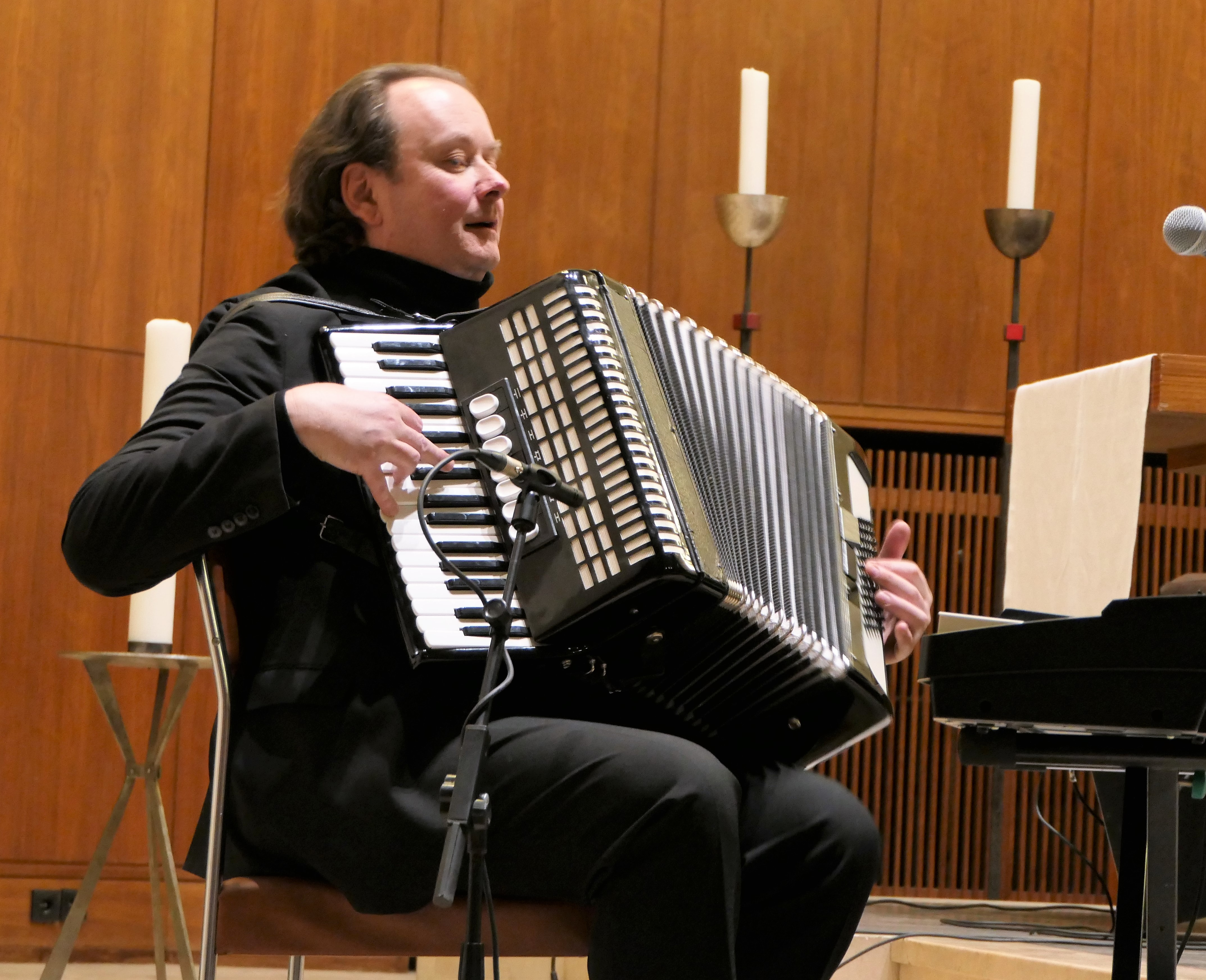 Jazzmusiker Alexander Hopff während eines Auftritts der Klezmer-Band Mischpoke in Dresden am 9. März 2018